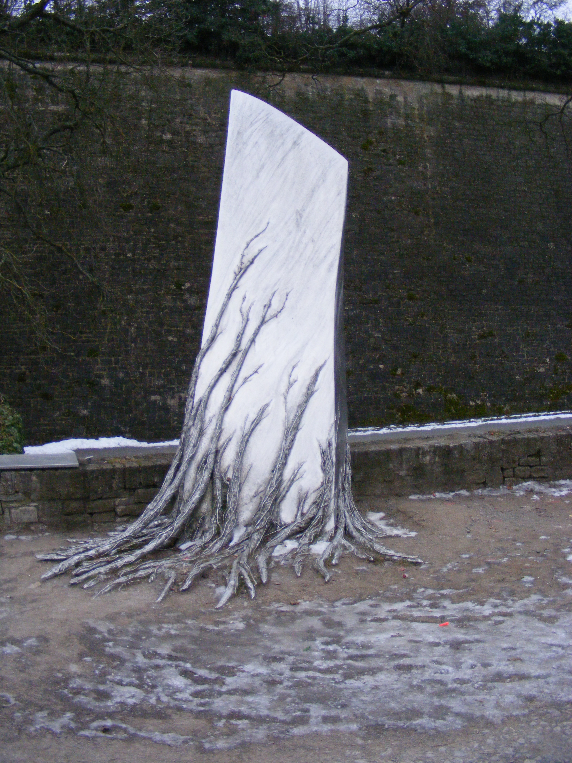 Denkmal zur Erinnerung an die Niederschlagung des Bauernaufstandes 1525 bei der Festung Marienberg in Würzburg.